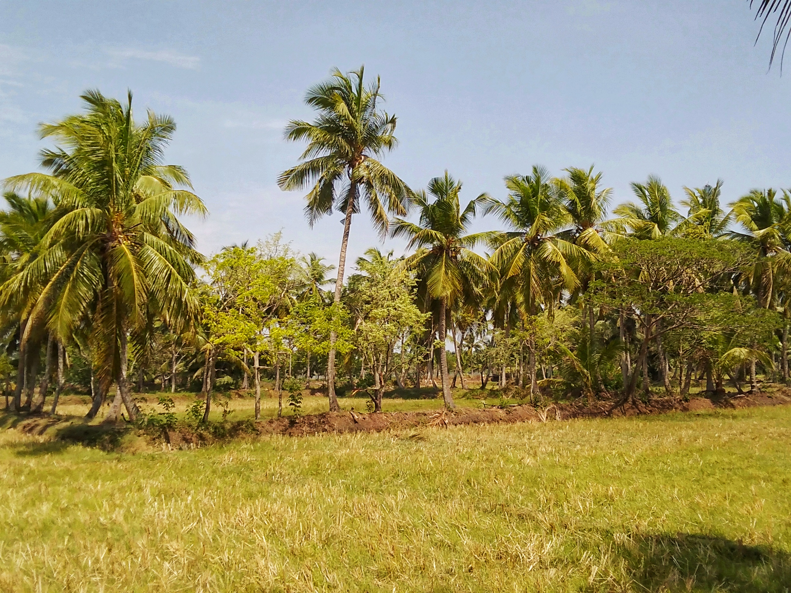 కోనసీమ లో కొబ్బరి చెట్లు